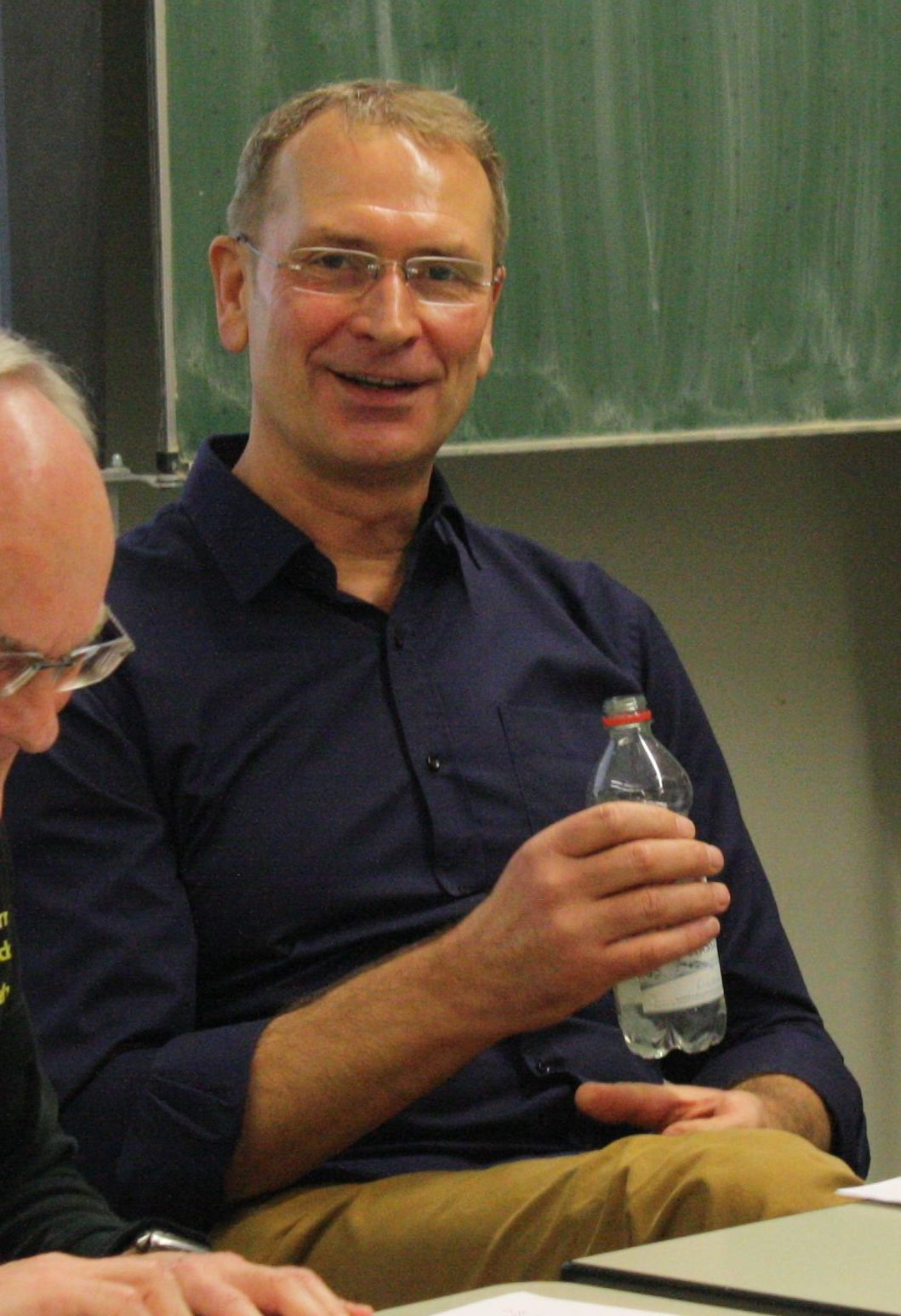 Financial T('a)ime (FT), Schülerzeitung der Kaufmännischen Schule Tauberbischofsheim.